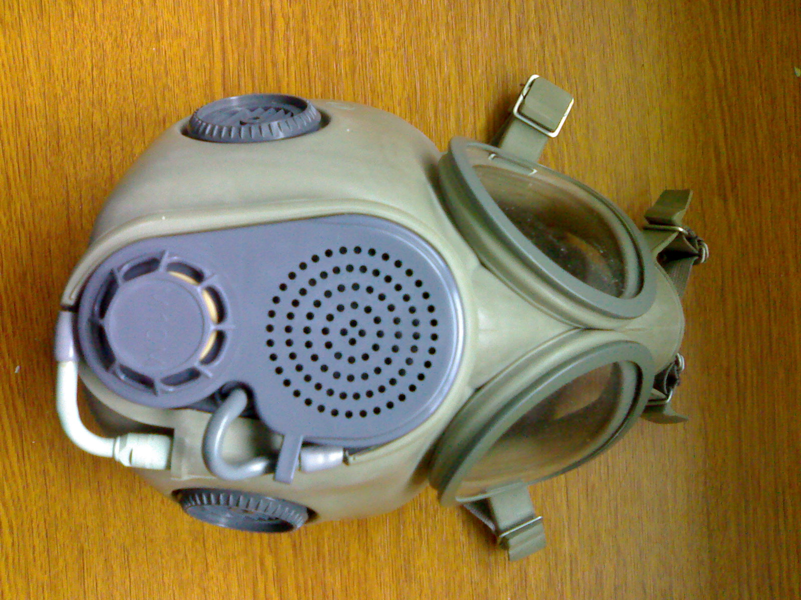 Czech Gas mask OM-10-M